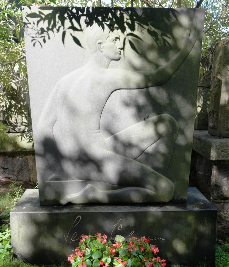 Grab des finnischen Komponisten und Pianisten Selim Palmgren (1878-1951) auf dem Friedhof Hietaniemi in Helsinki